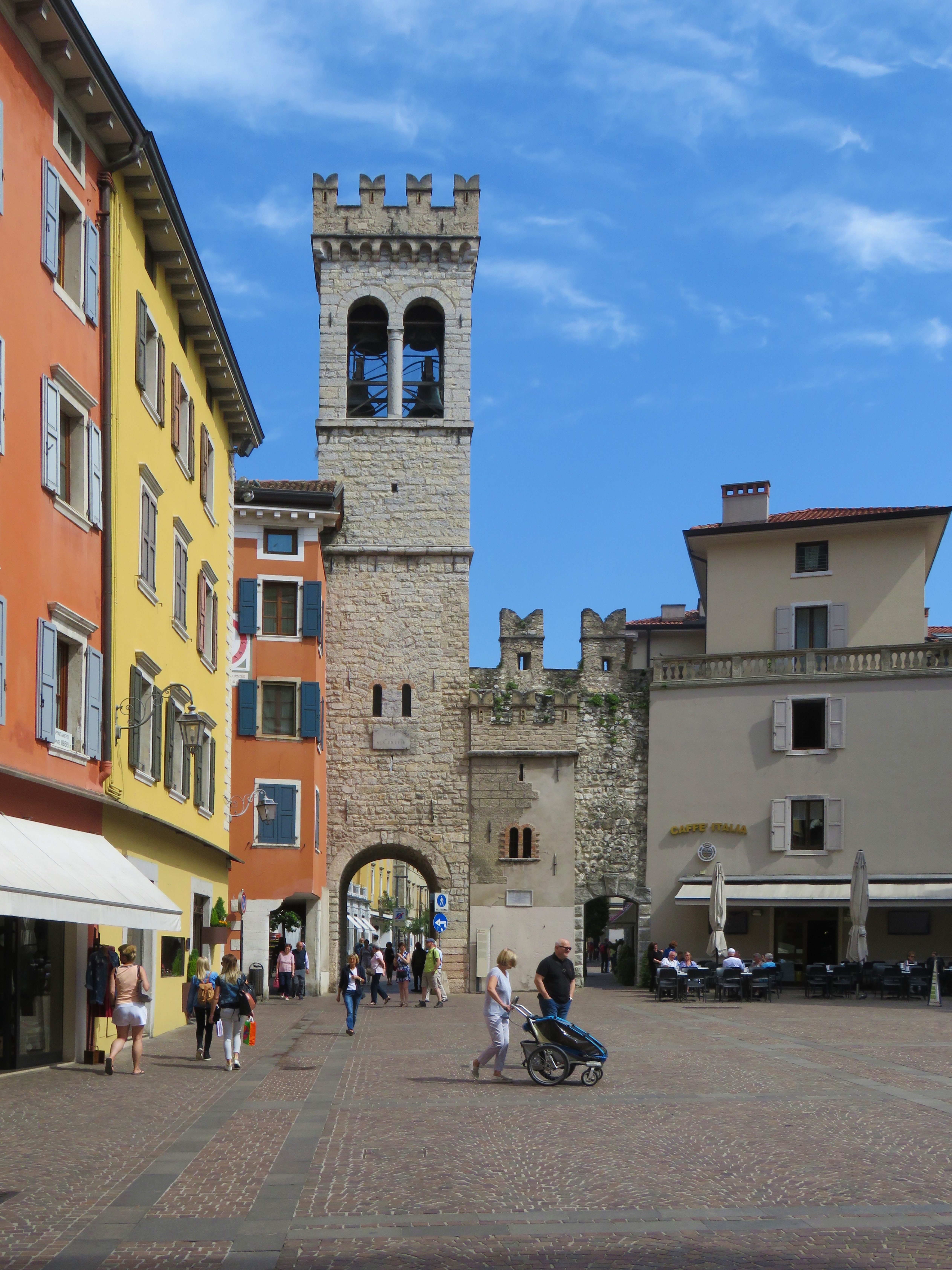 Porta-torre di San Michele. Svolge la tripla funzione di porta, di torre cittadina e di campanile della chiesa di Santa Maria Assunta.